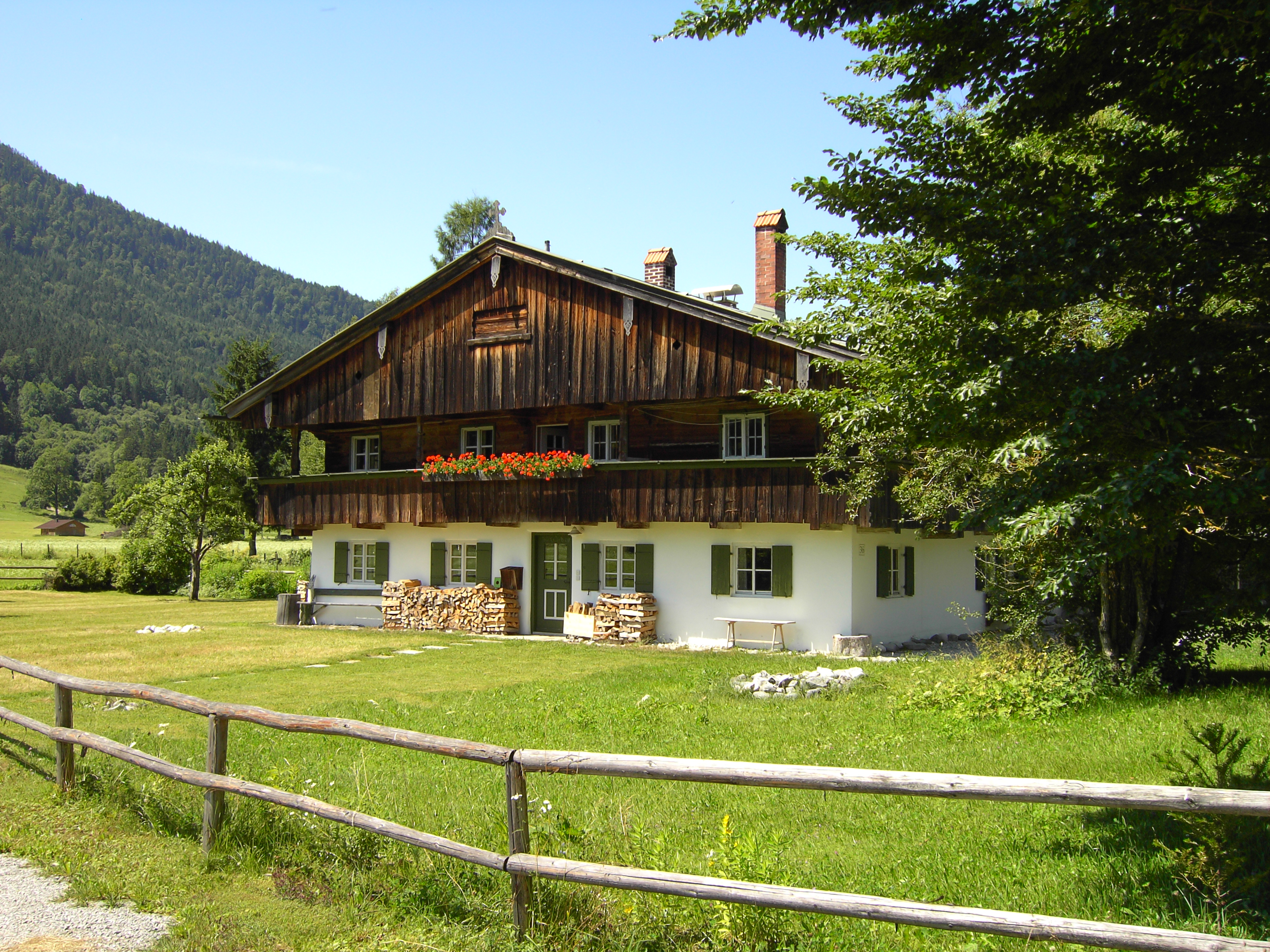 Reiserhof im Ortsteil Niggeln in Jachenau